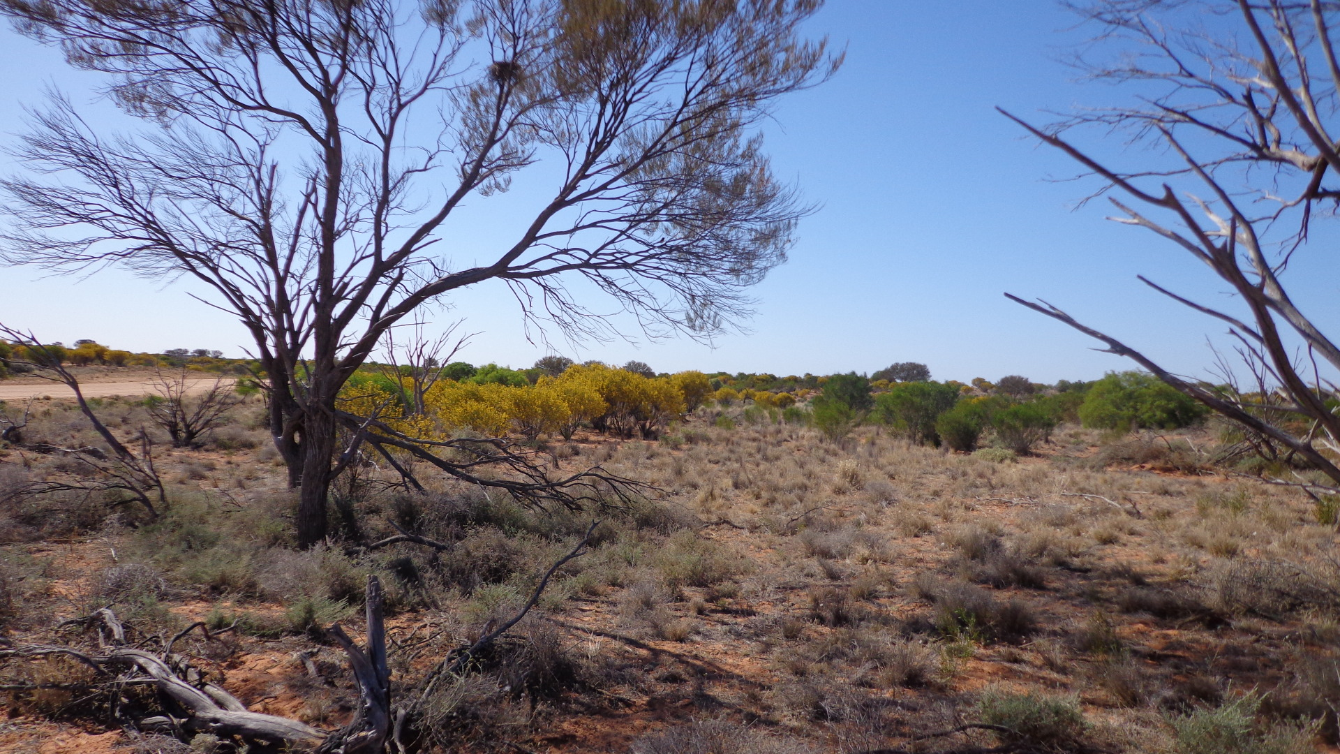 Western Lands